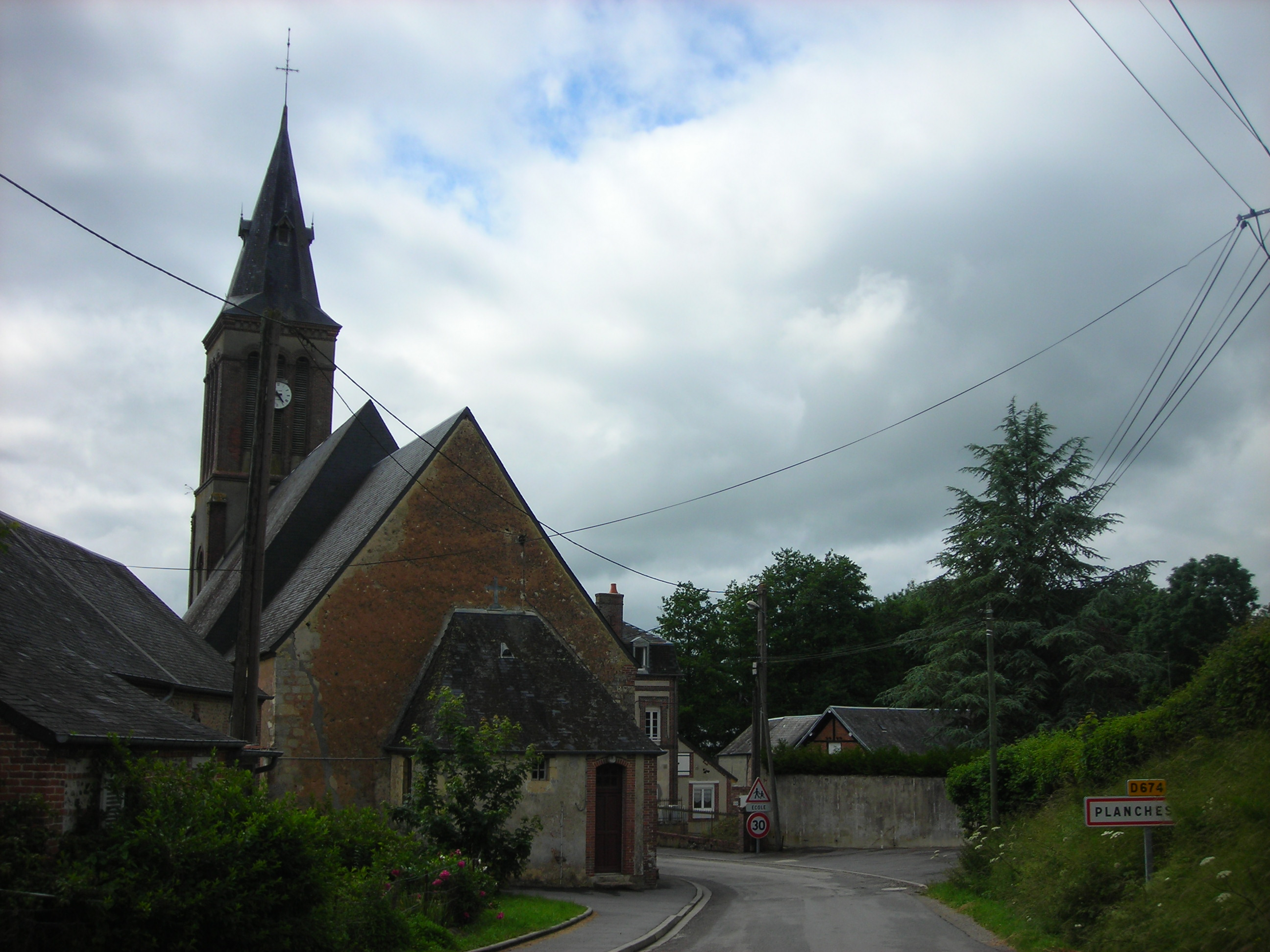 Entrée du village de Planches avec vue de l'église (Orne, France).